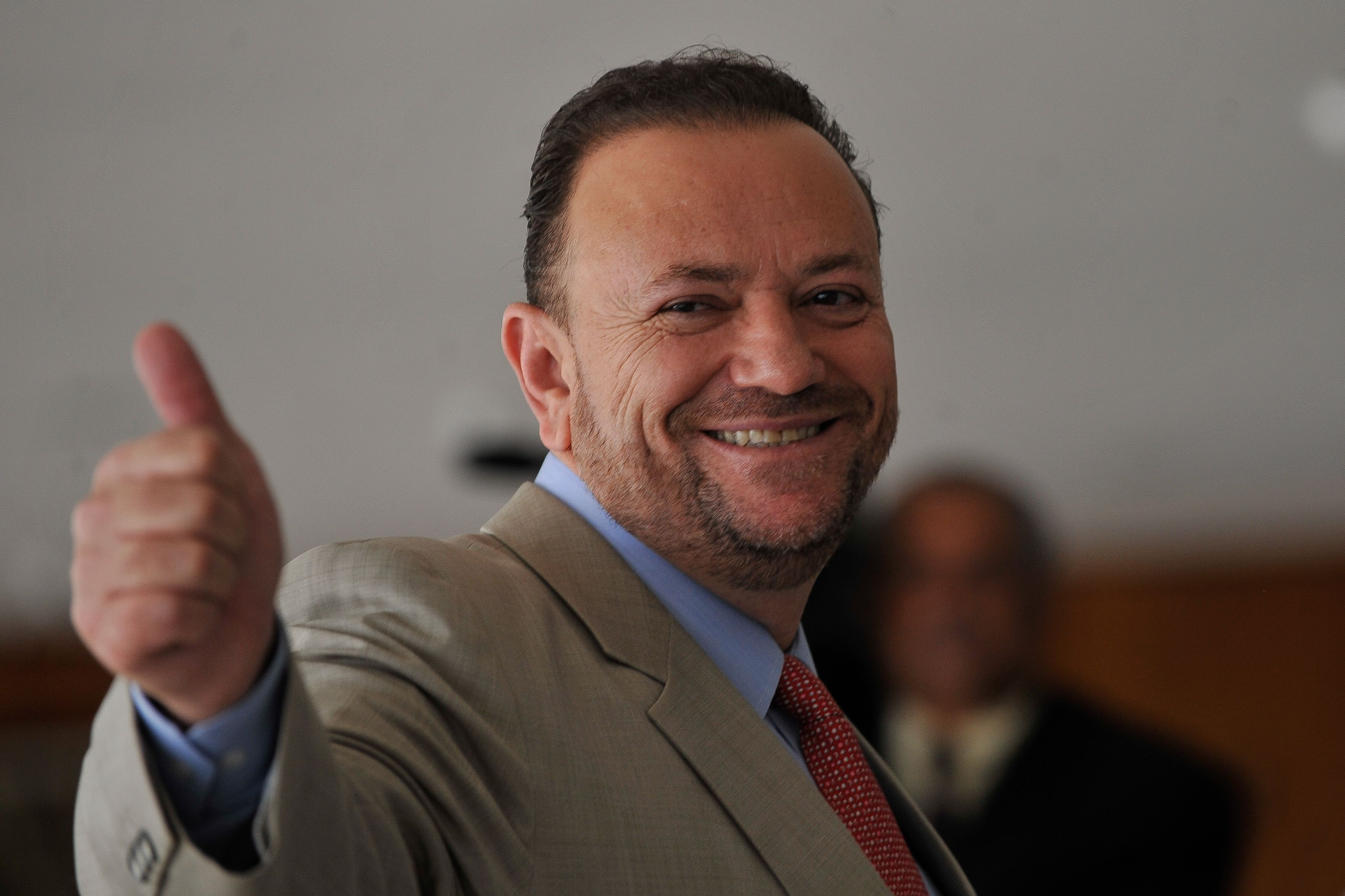 O ministro-chefe da Secretaria de Comunicação Social da Presidência da República, Edinho Silva, chega para o Café da Manhã com jornalistas no Palácio do Planalto.